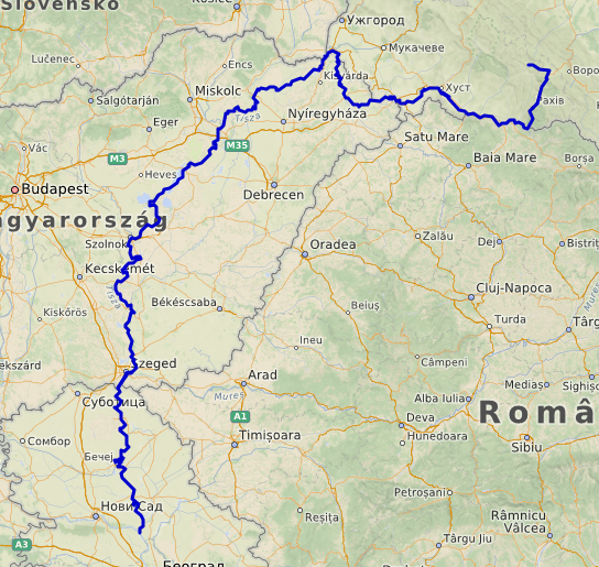 Carte réalisée sur umap This map may be incomplete, and may contain errors. Don't rely solely on it for navigation.